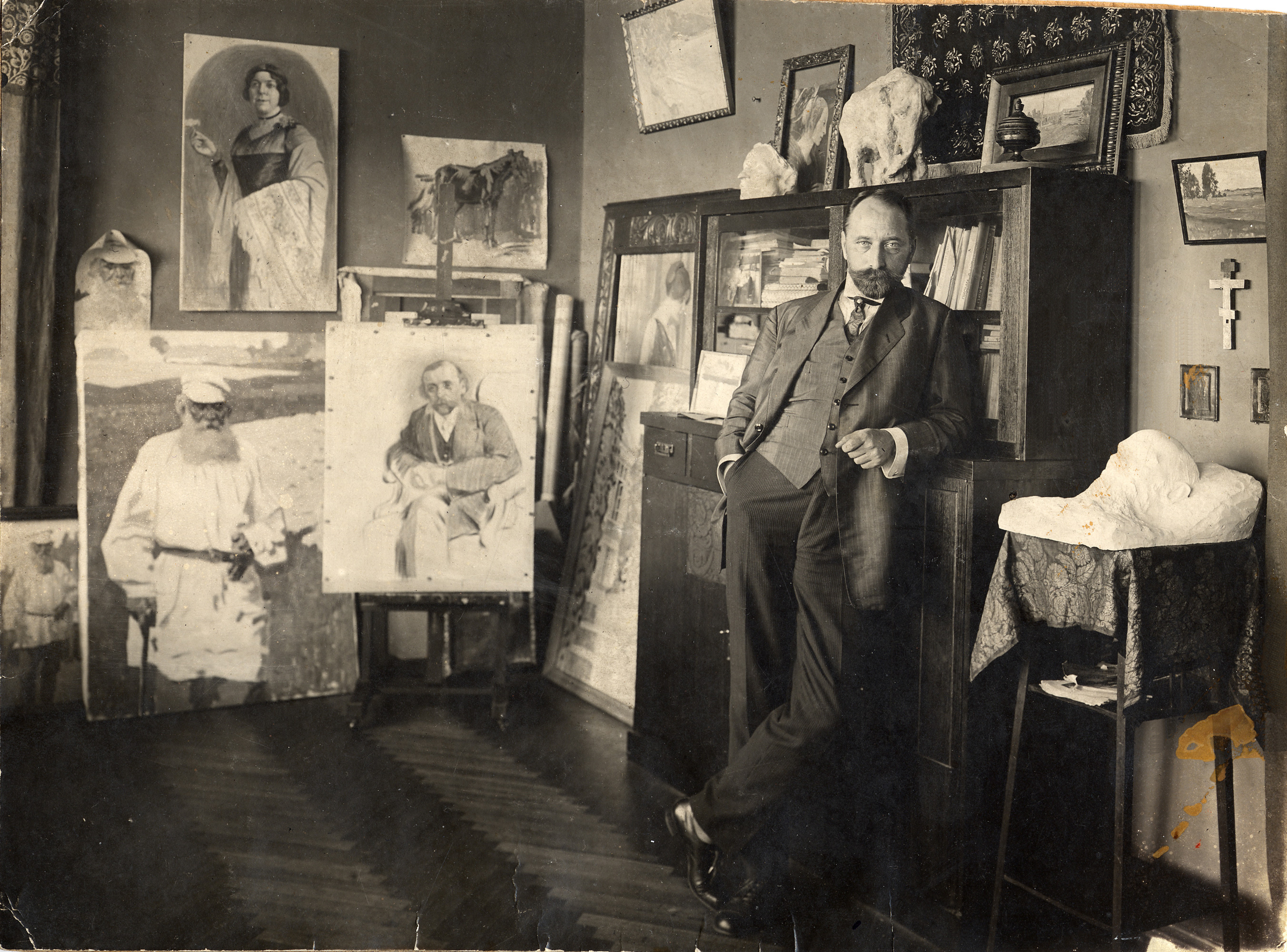 Художник Россинский В.И. в своей мастерской. Москва, Россия, Б. Гнездовский пер., дом 10. Приблизительно 1915-1919 г.г.